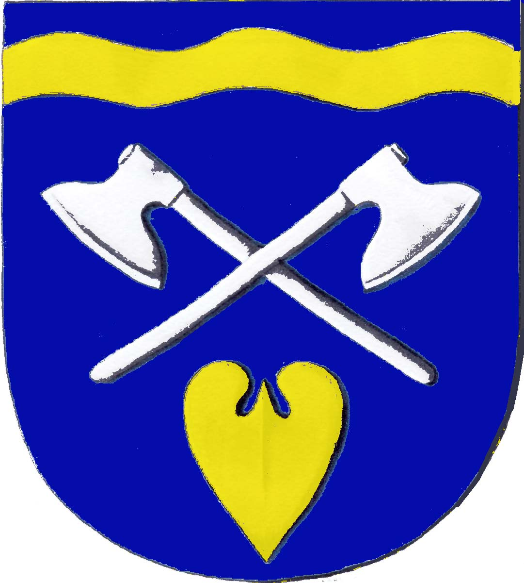 Znak obce Budeč (okres Jindřichův Hradec)